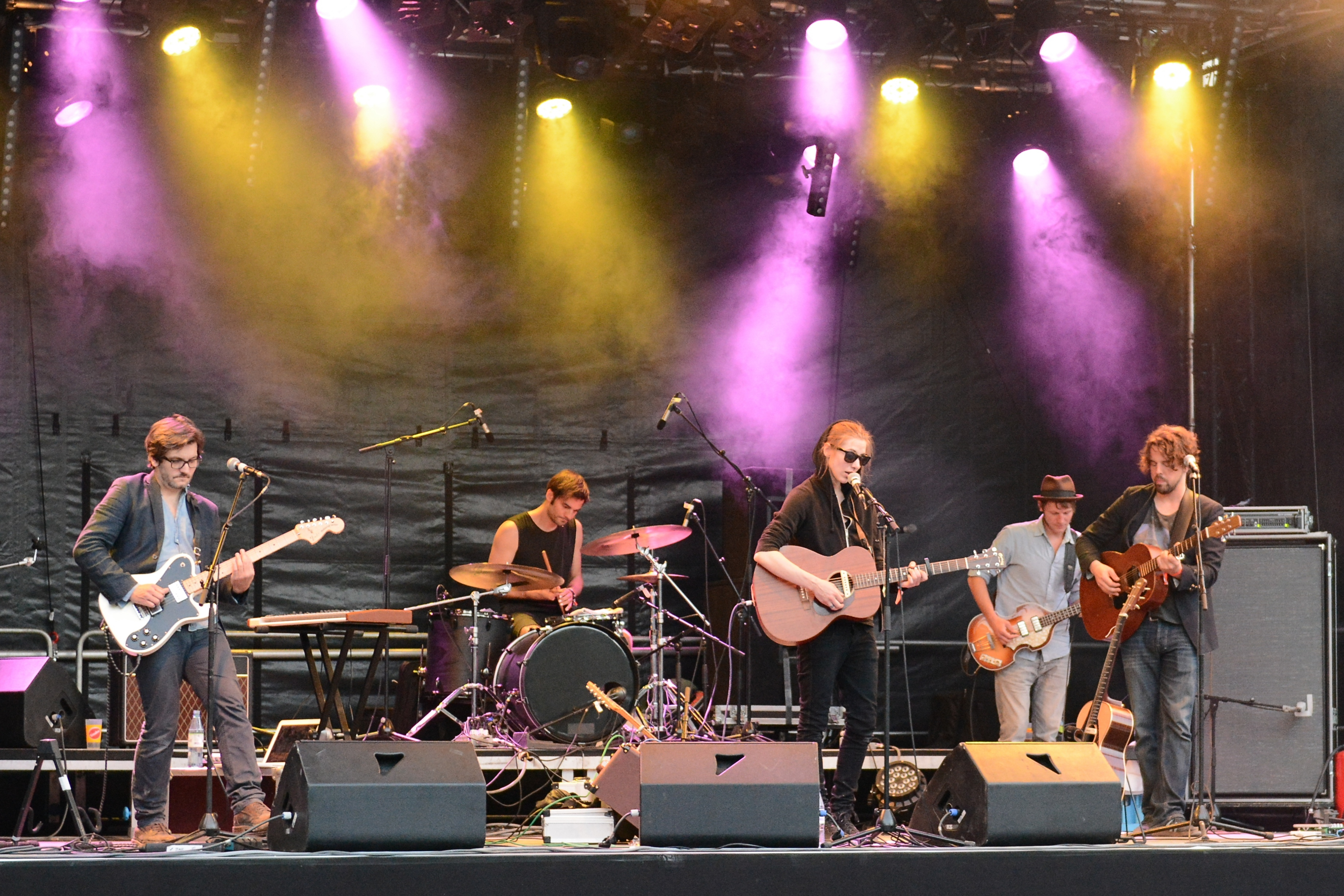 Desiree Klaeukens beim Traumzeit-Festival 2014